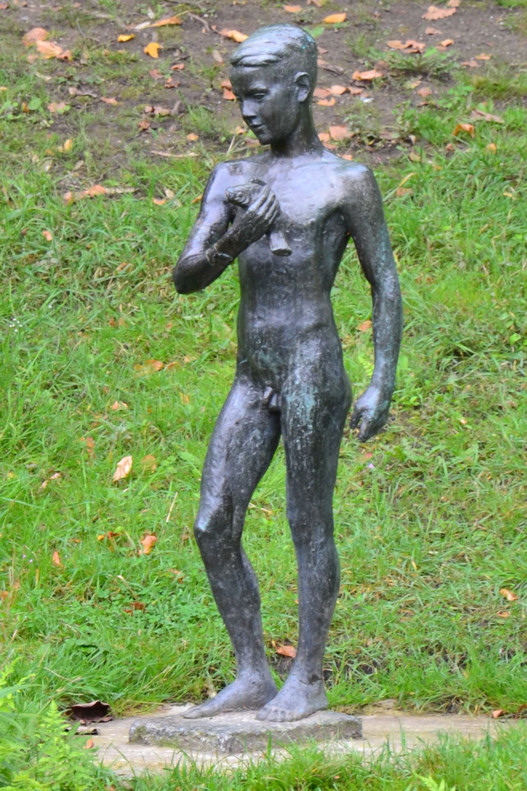 Skulptur von Ernst Hackländer: Junge mit Fisch; befindet sich im Grugapark Essen